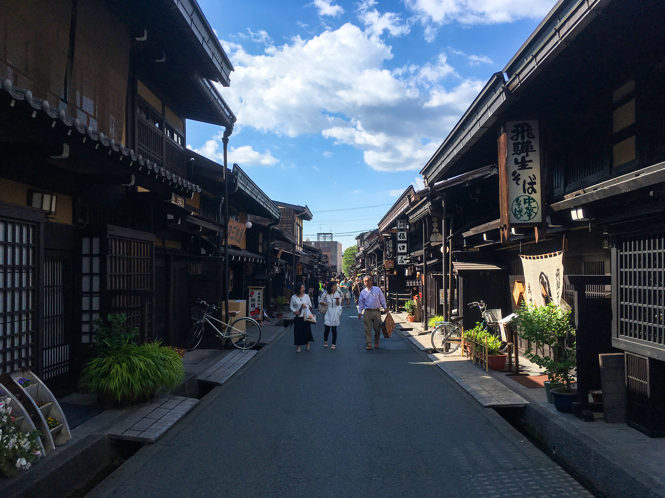 Sanmachi Takayama